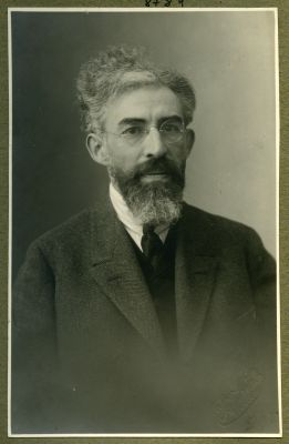 Alexander Lipschütz